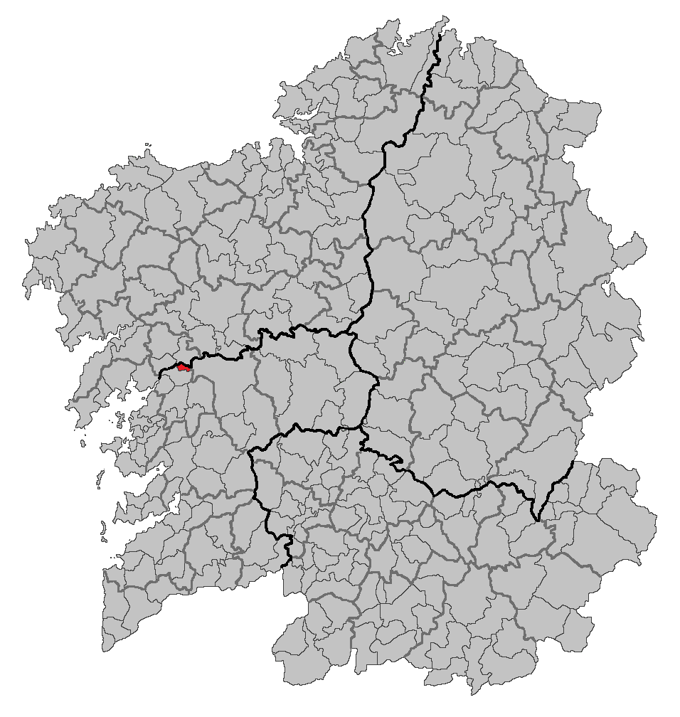 Mapa coa localización do concello de Pontecesures.